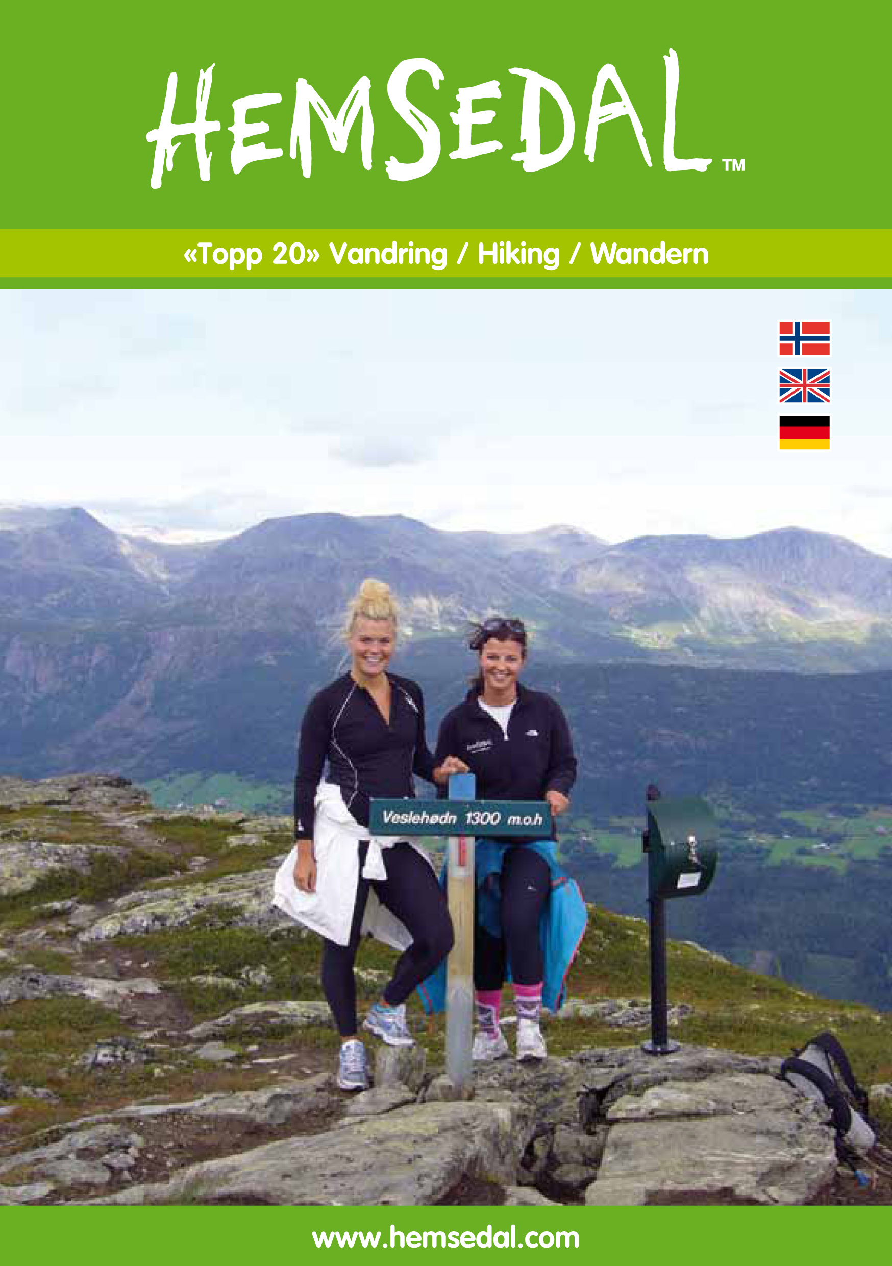 Topp 20 Hemsedal